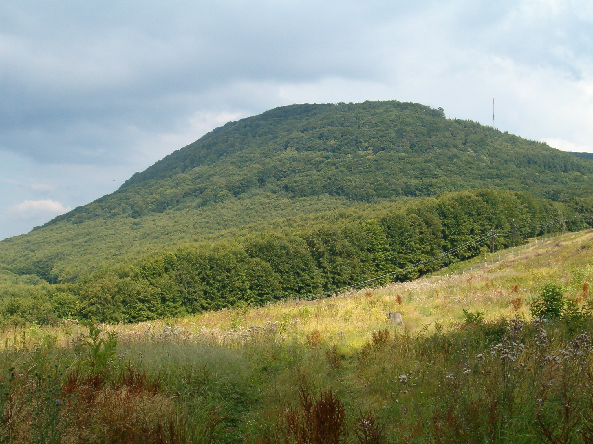 A Sombokor tömbje Ny felől (Mátra)